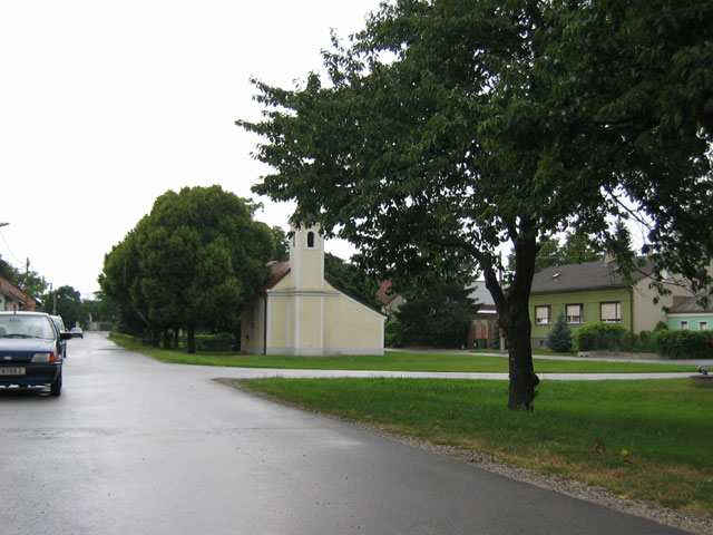 Kapelle Großhofen: Lizenz: GNU FDL Quelle: Foto plp Datum: de:2004 Ort: Großhofen, Niederösterreich, Österreich